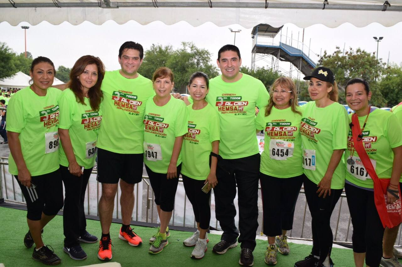 Organiza Francisco Cienfuegos la Tercera Edición de la Carrera Al Cien